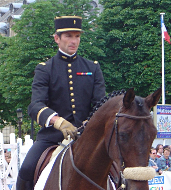 Didier Courrèges en uniforme du Cadre Noir Party promoting the candidacy of Paris to the 2012 Olympic Games., Avenue des Champs-Élysées (Paris), 5 June 2005